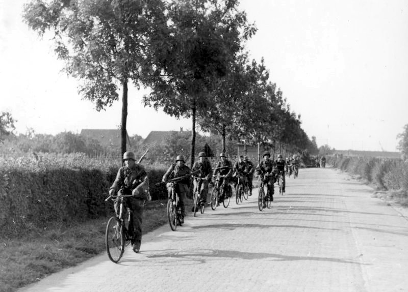 Arnheim, Radfahrschwadron im Anmarsch Scherl Bilderdienst Westen, September 1944, Anglo-amerikanischer Umfassungsplan bei Arnheim gescheitert. Kaum sind die ersten feindlichen Lastensegler gelandet, setzen sich die deutschen Eingreifreserven in Bewegung. Eine Radfahrschwadron auf dem Marsch zur Landestelle. SS-PK. Pospesch ADN-Bildarchiv, II. Weltkrieg 1939-45, Schlacht um Arnheim (Holland) vom 17.-27.9.1944 Die am 17.9.1944 begonnene alliierte Luftlandeoperation bei Arnheim sollte die Übergänge Rhein, Maas und Waal sichern. Nach großen Verlusten wurden die gelandeten Truppen Ende September zurückgezogen. Diese Radfahrsschwadron gehört zu den rasch zusammengefaßten deutsche Kräften, die gegen die kürzlich gelandeten alliierten Fallschirmjäger in Marsch gesetzt wurden. Aufnahme: Pospesch